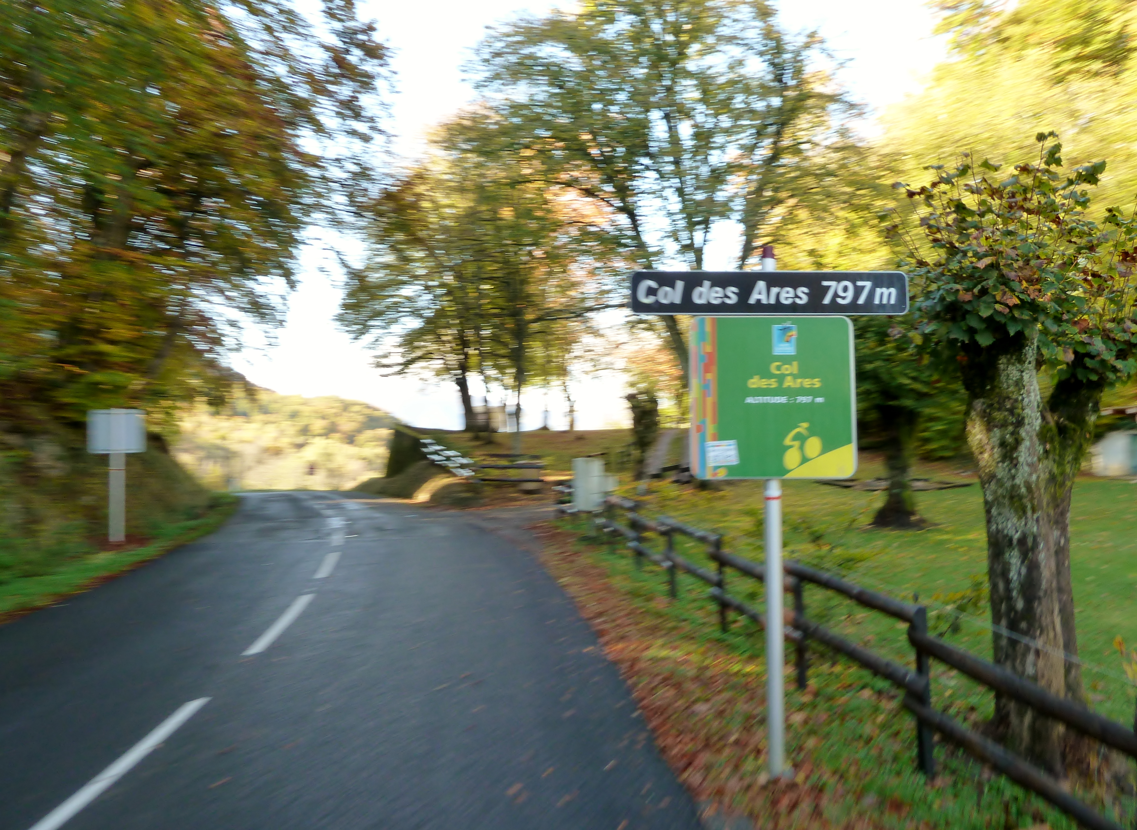 Col des Ares